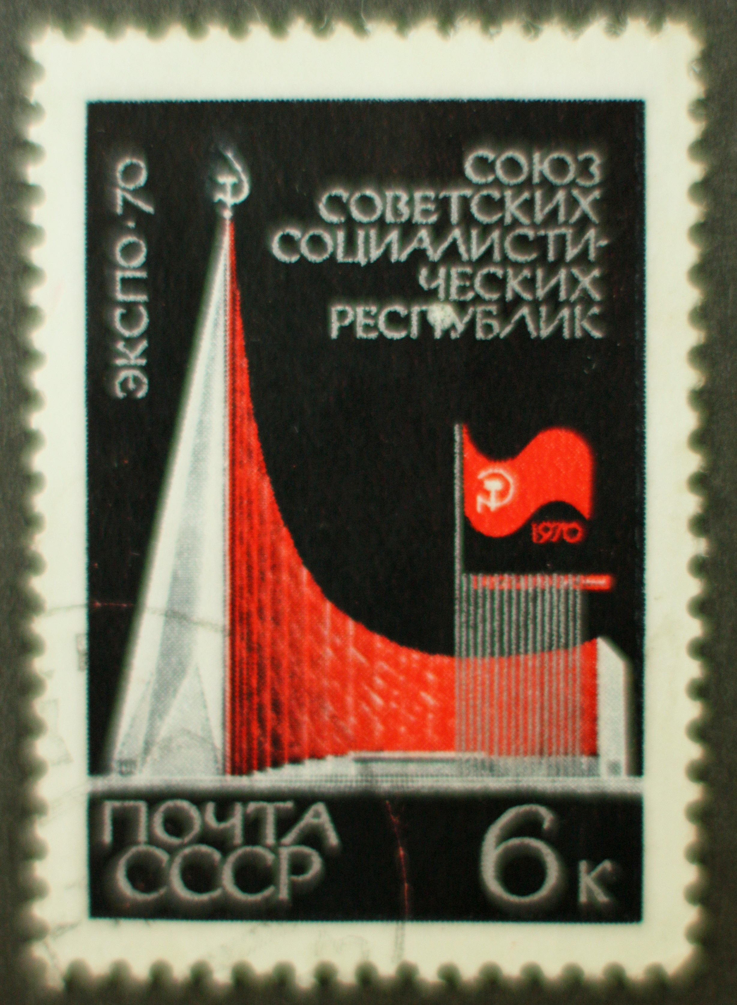 Briefmarke, Sowjetunion